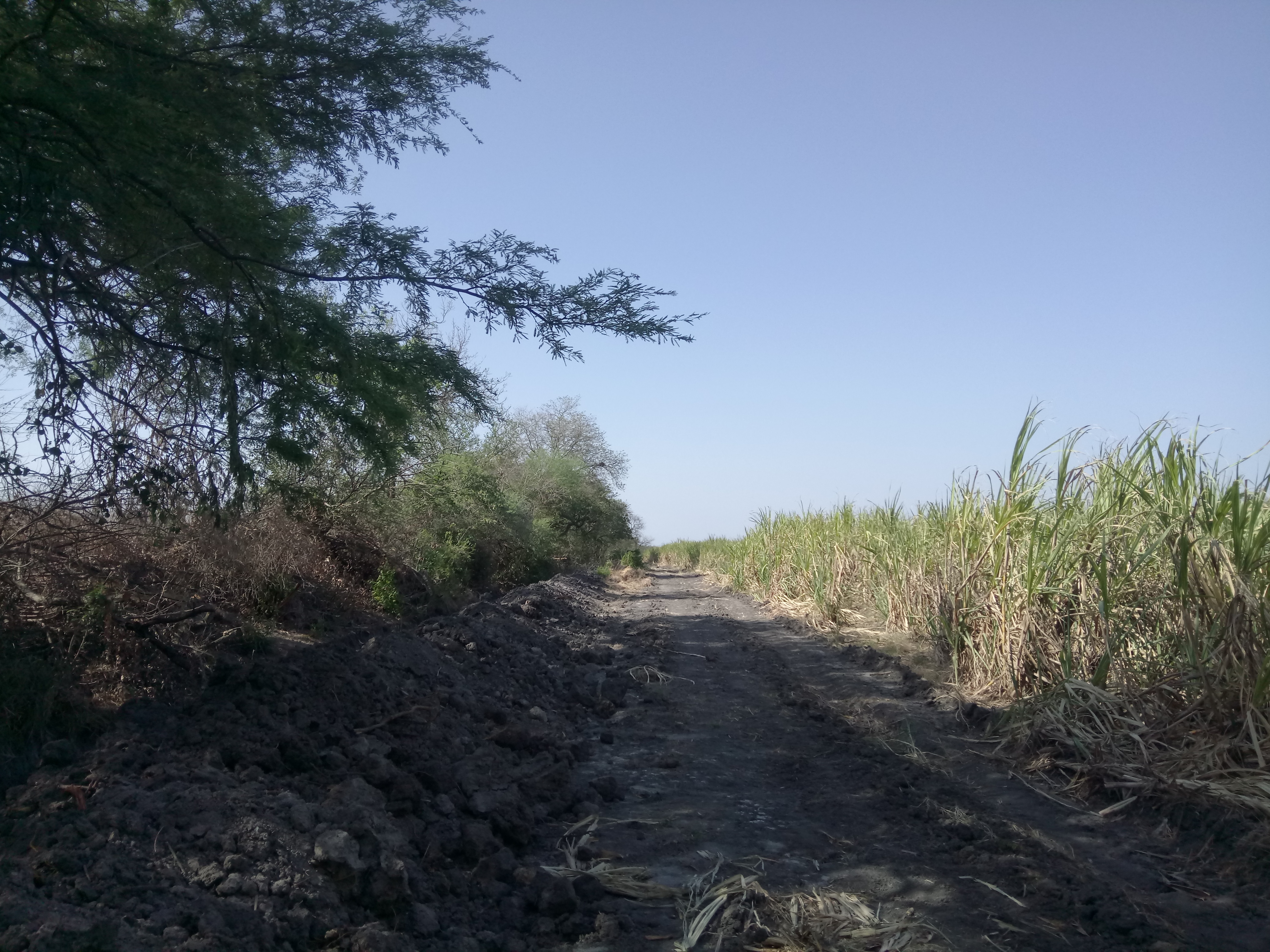 Camino hecho para que las máquinas y camiones transiten entre las cañas y puedan dejar o llevar el producto. El Mante, Tamaulipas.